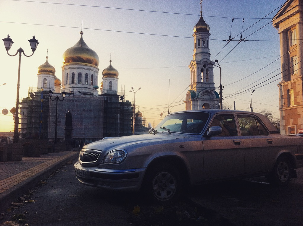 Волга 31105 на соборной площади г.Ростова-на-Дону.